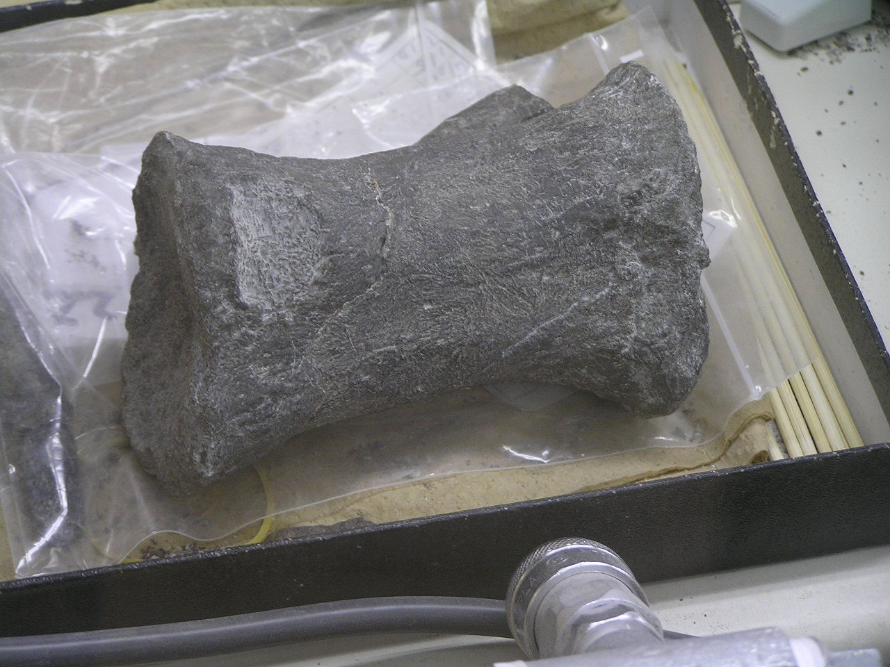 丹波竜化石の一部